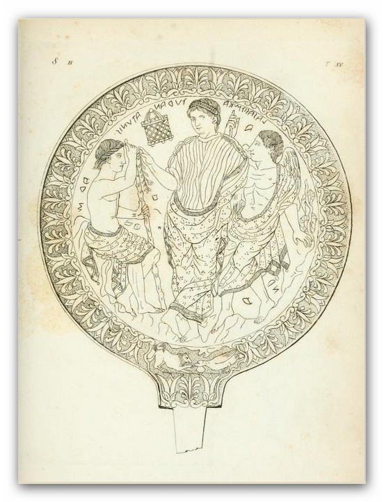 Illustration aus "Monumenti etruschi o di etrusco nome ... Band II", Apendix, p 15